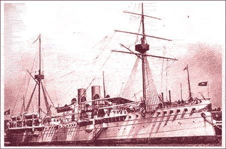 Бронепалубный крейсер Маха Чакри